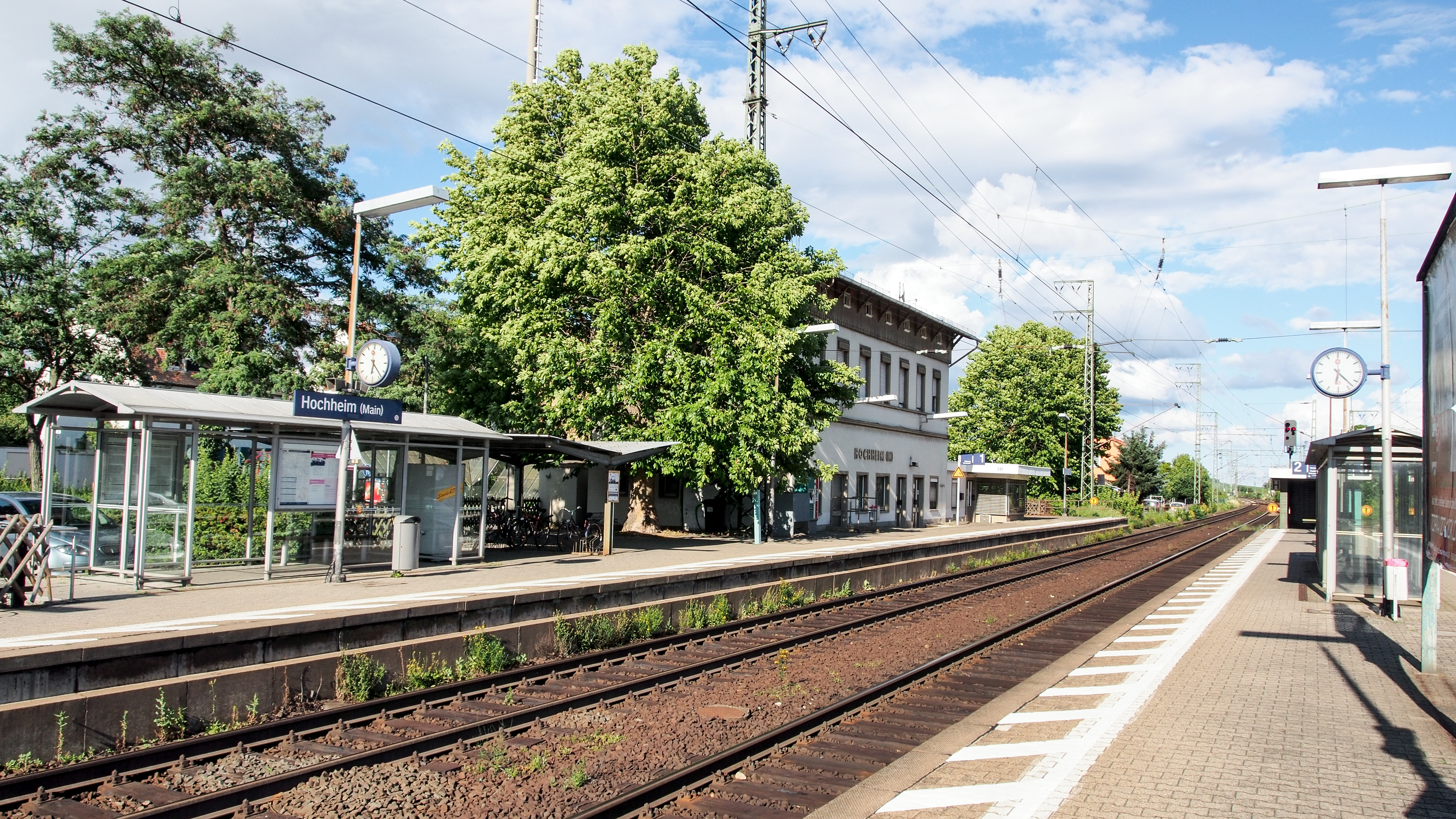 Der Bahnsteig des (S)-Bahnhofes von Hochheim am Main